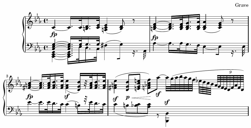 Description : Quatre premières mesures de l'introduction de la Sonate pour piano n° 8 de Ludwig van Beethoven (1799) Auteur : Propre travail réalisé avec Lilypond